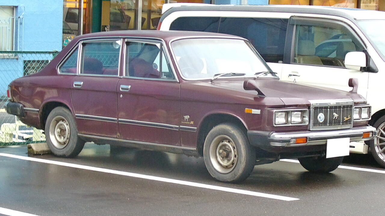 いすゞ・フローリアン（後期型）